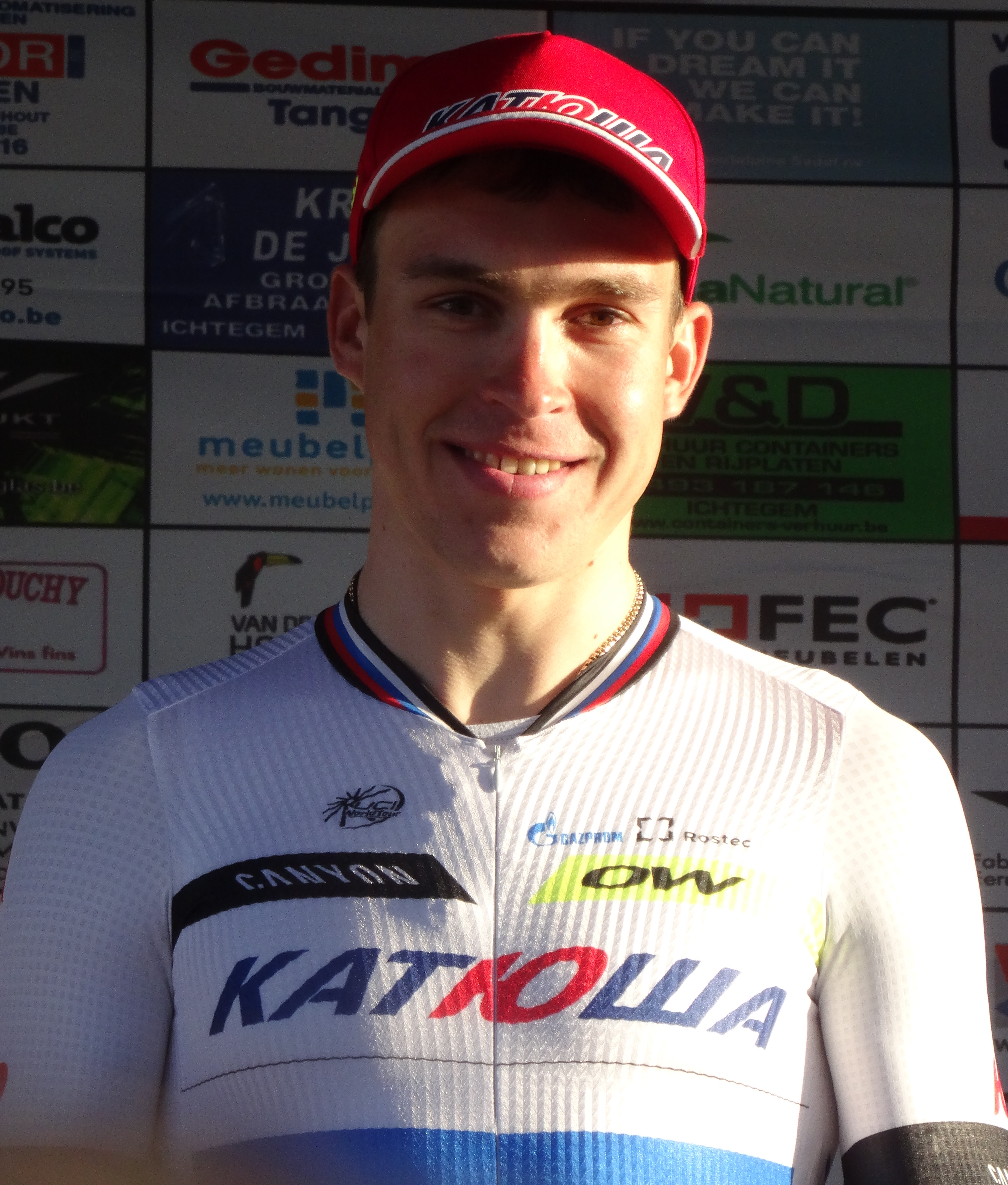 Prologue de Driedaagse van West-Vlaanderen 2015... Depicted person: Anton Vorobyev Depicted team: Katusha